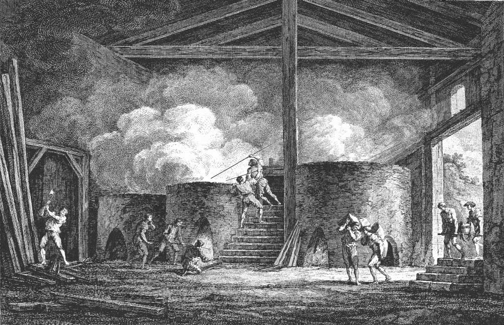 Jean-Claude Richard de Saint-Non (1786) Fabrique de reglisse à Corigliano